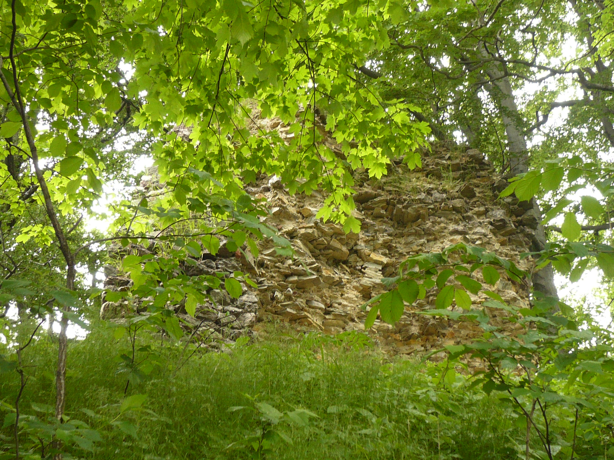 Zamek Homole